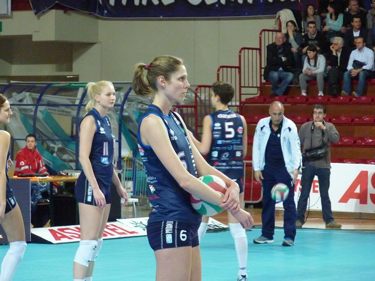 Sarah Pavan, pallavolista canadese, gioca nel ruolo di schiacciatrice ed opposto.